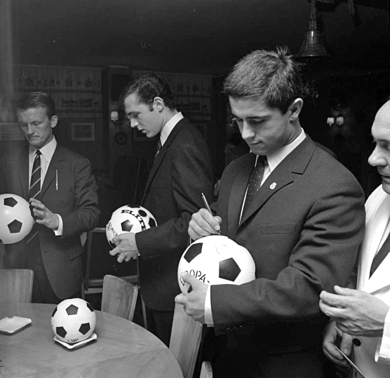 Staatsmin. Heubl, Bayer. Landesvertretung, empfängt die Fußballmannschaft Bayern-München (Europa-Cup-Sieger)